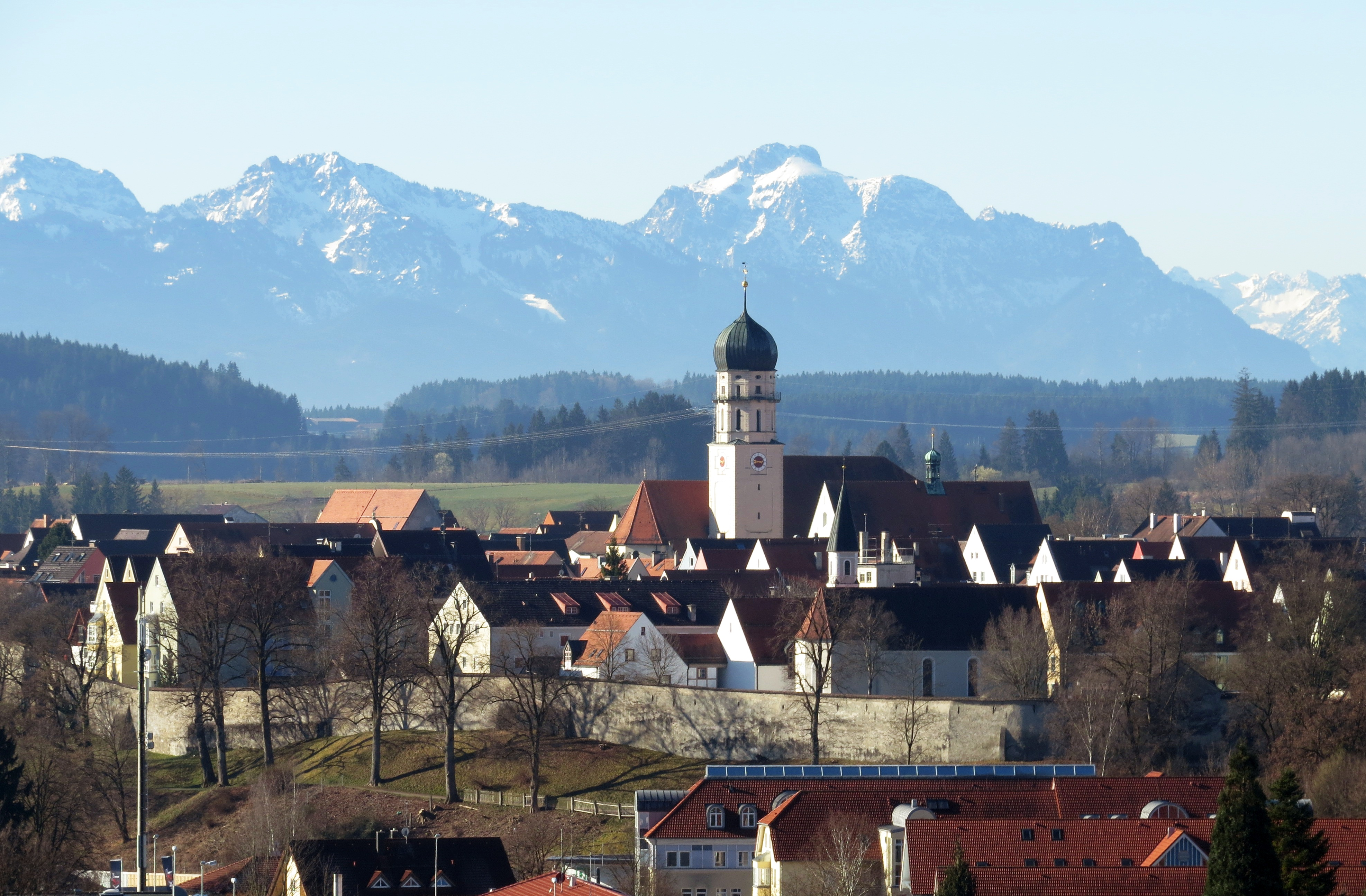 Schongau, Altstadt mit Stadtmauer und Pfarrkirche Mariä Himmelfahrt, von den ca. 1500m nördlich liegenden Anhöhen aus gesehen. Im Hintergrund (etwa 30km Luftlinie entfernt) Hoher Straußberg, Branderschrofen (Tegelberg) und Säuling.